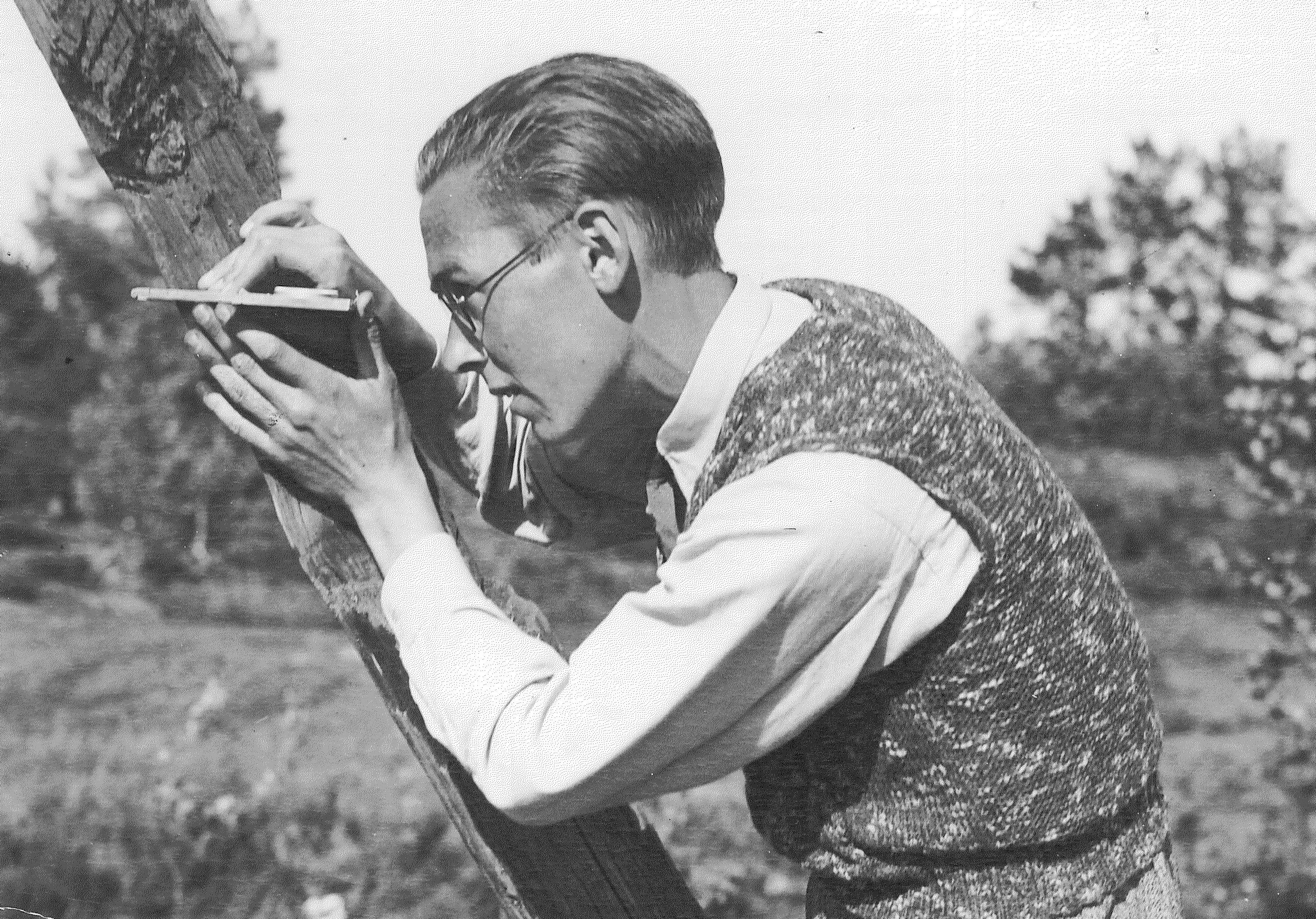 Gösta Wijkman, död 1944, svensk profil inom orienteringssporten. Fotot från familjealbum, daterat 1933.